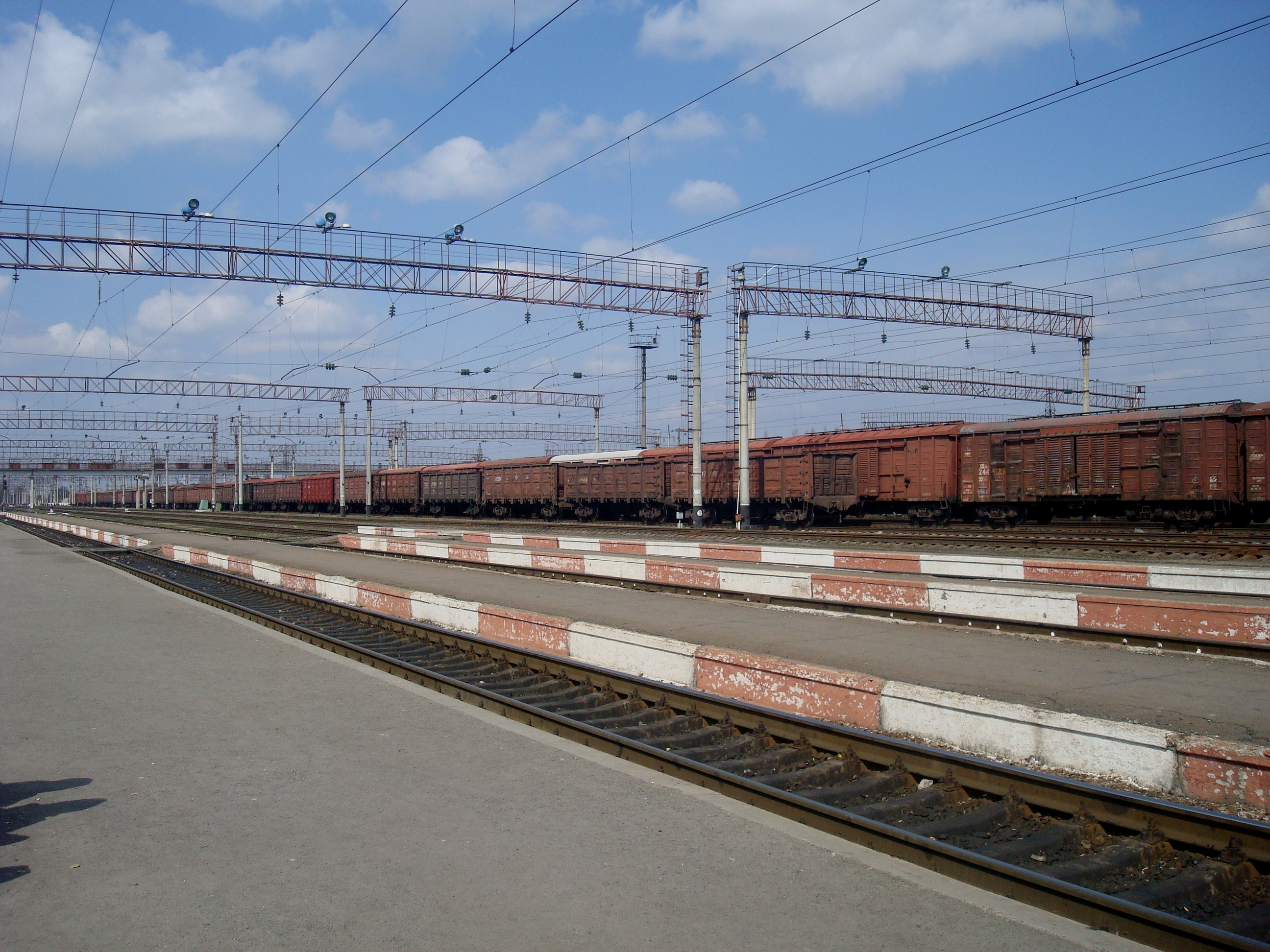 Станція Гречани.1,2,3,4-а платформи. Вид в сторону Тернополя